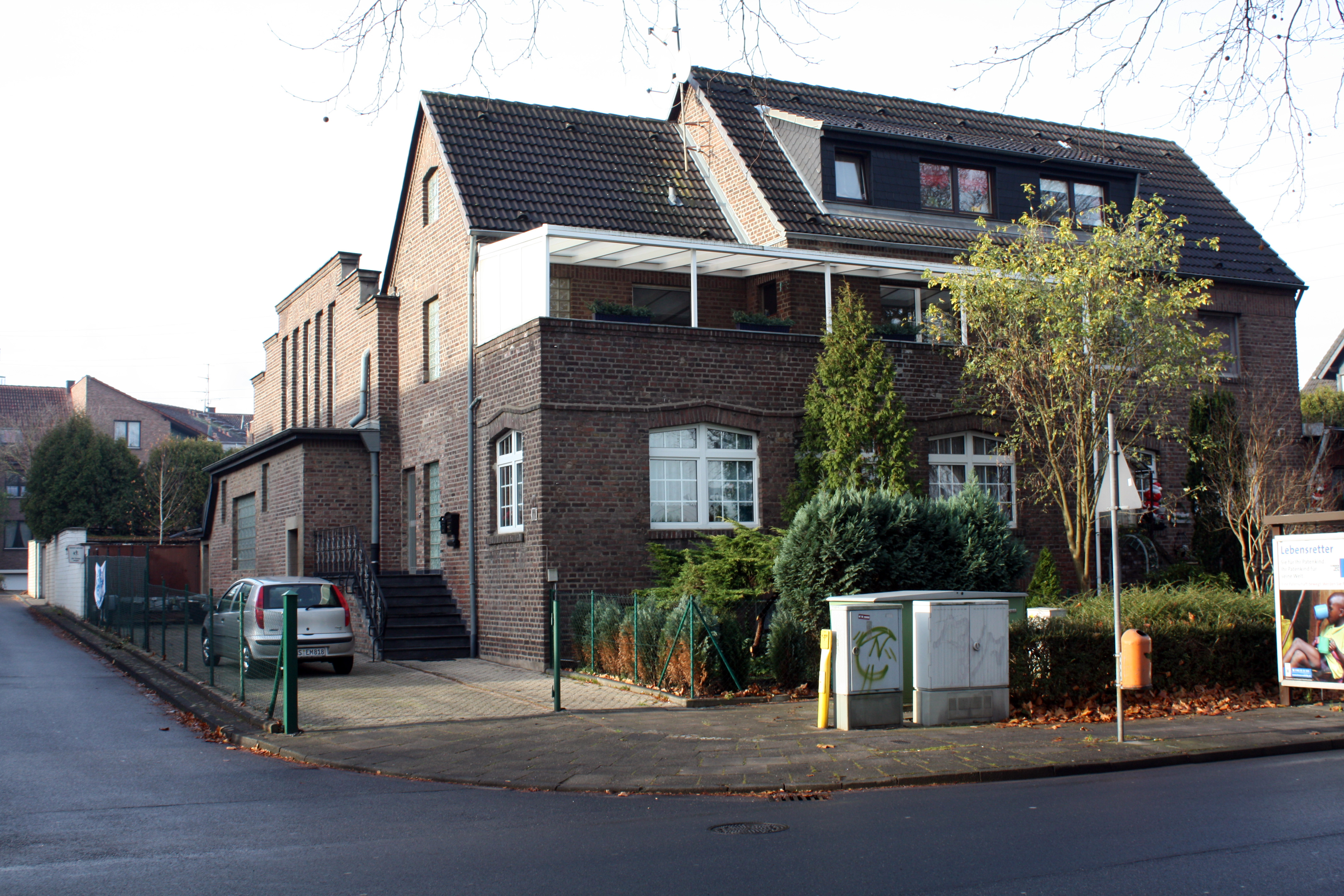 Hürth-Fischenich, erhaltenes altes Gebäude "An der Markthalle" (ehemalige Obst- und Gemüseversteigerungshalle)